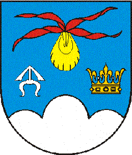 Herb gminy Trzyciąż woj. małopolskie